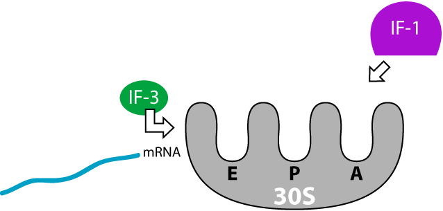 Initiation der Translation thumbnail